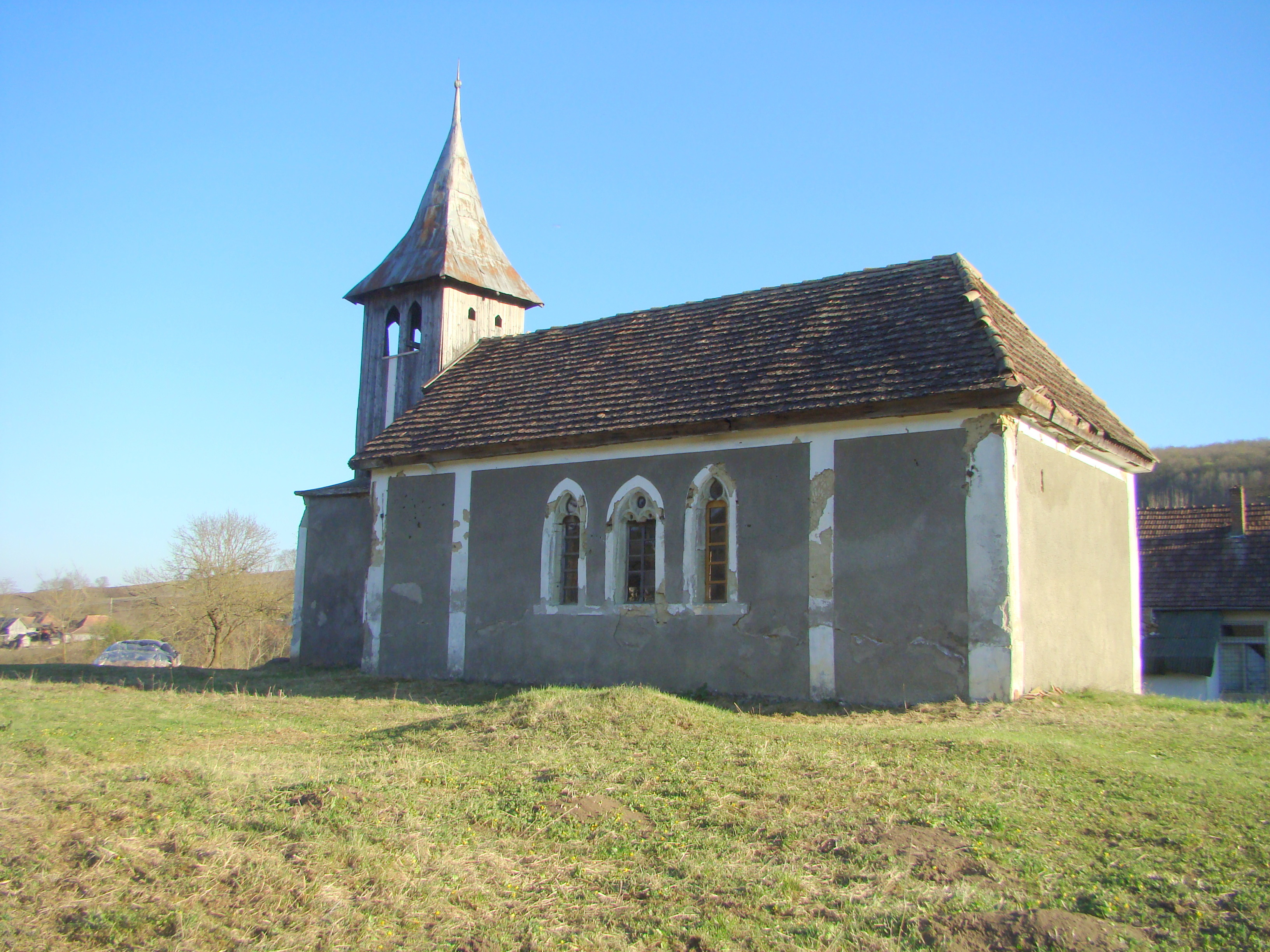 Biserica reformată, sat Delureni; comuna Urmeniș